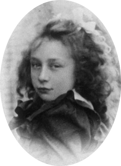 Portret van Maria Kessels